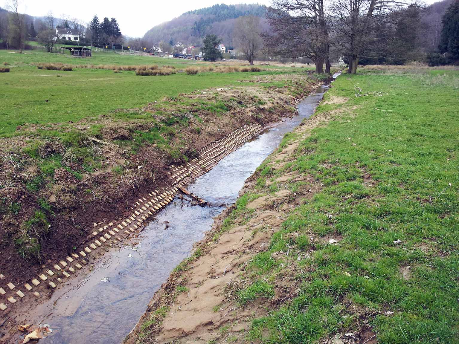 Gewässerrenaturierung Mühlbach vor den Renaturierungsmaßnahmen durch die ÖFM